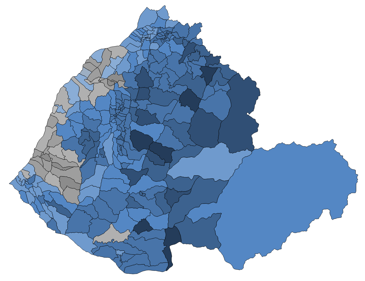 顏色對照表